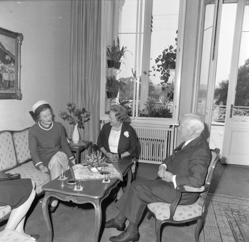 Bundespräsident u Gattin emfangen Frau Nancy Parkinson